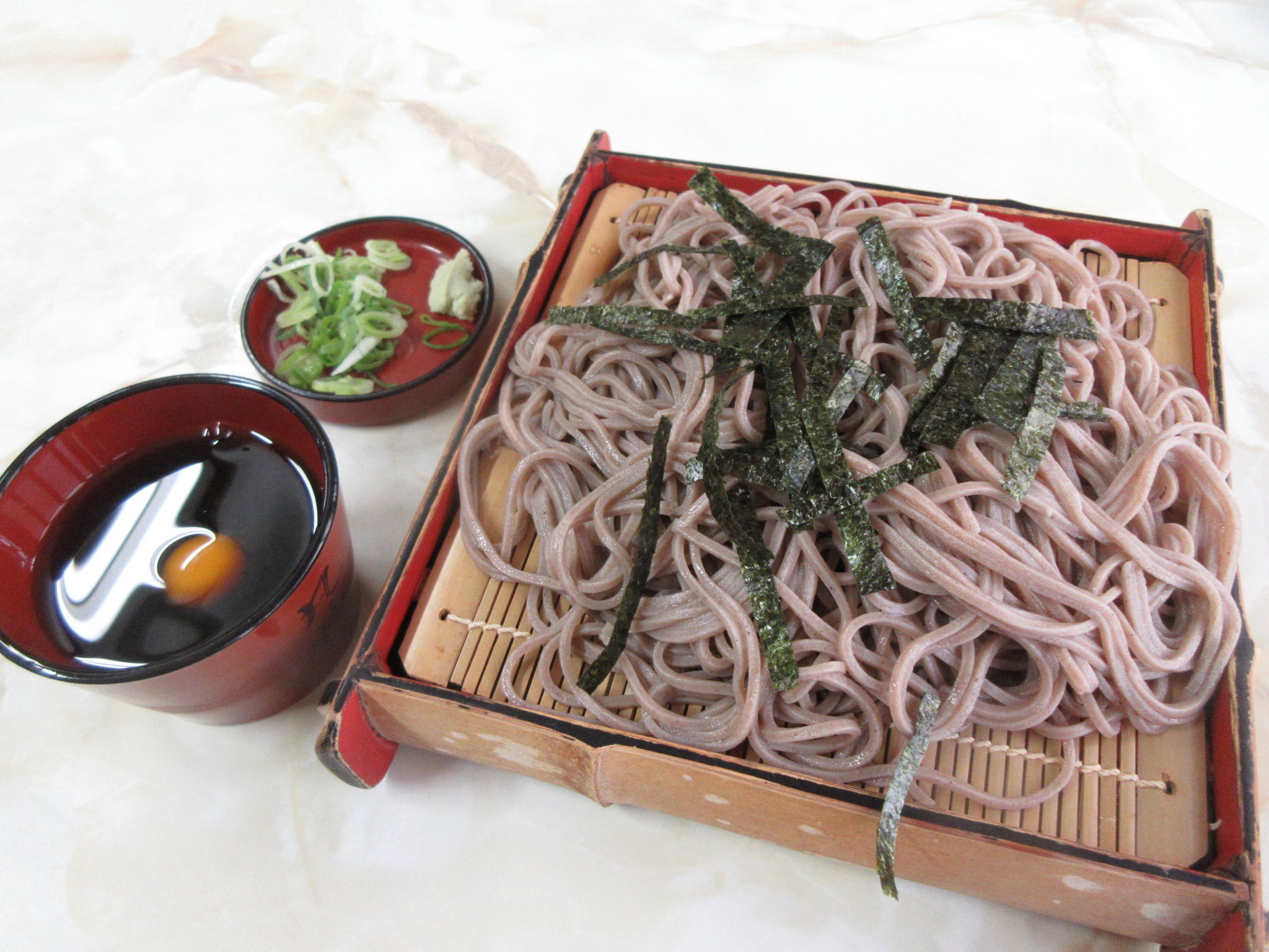 ざる蕎麦（愛知県にて撮影）